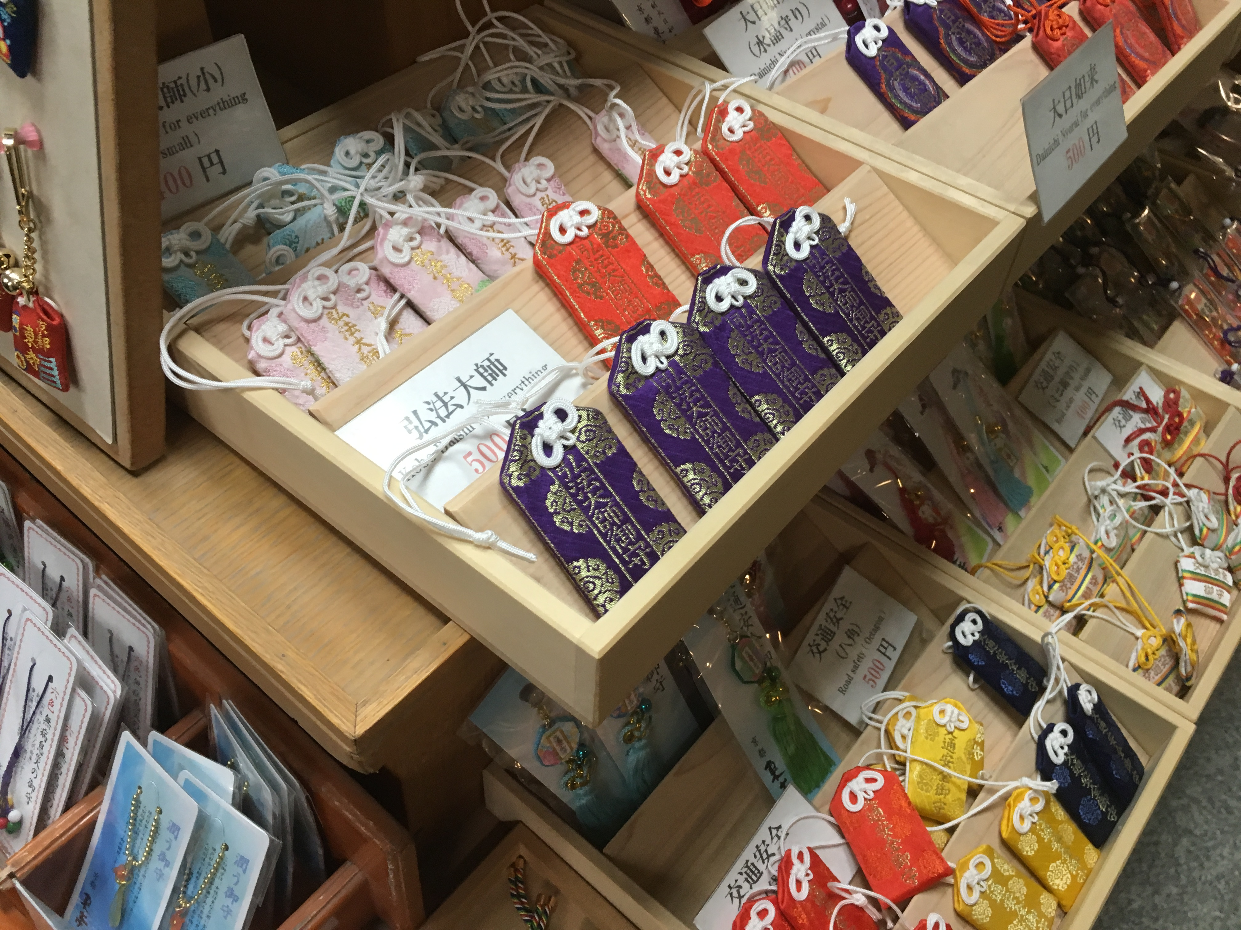 Omamori at Tōji (東寺のお守り)